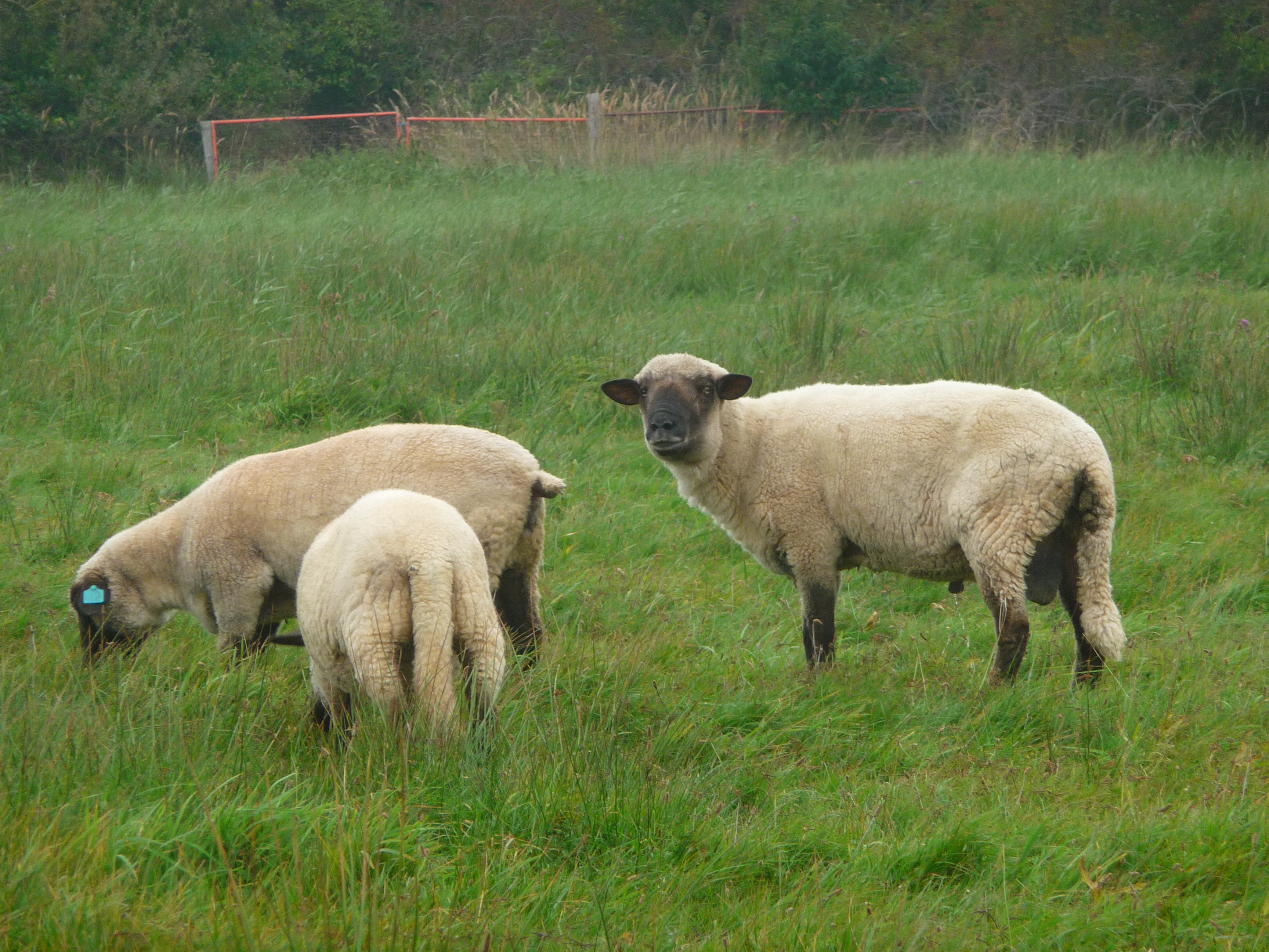 Deutsches schwarzköpfiges Fleischschaf, Widder mit zwei Auen auf der ostfriesischen Nordseeinsel Juist (Niedersachsen, Deutschland)